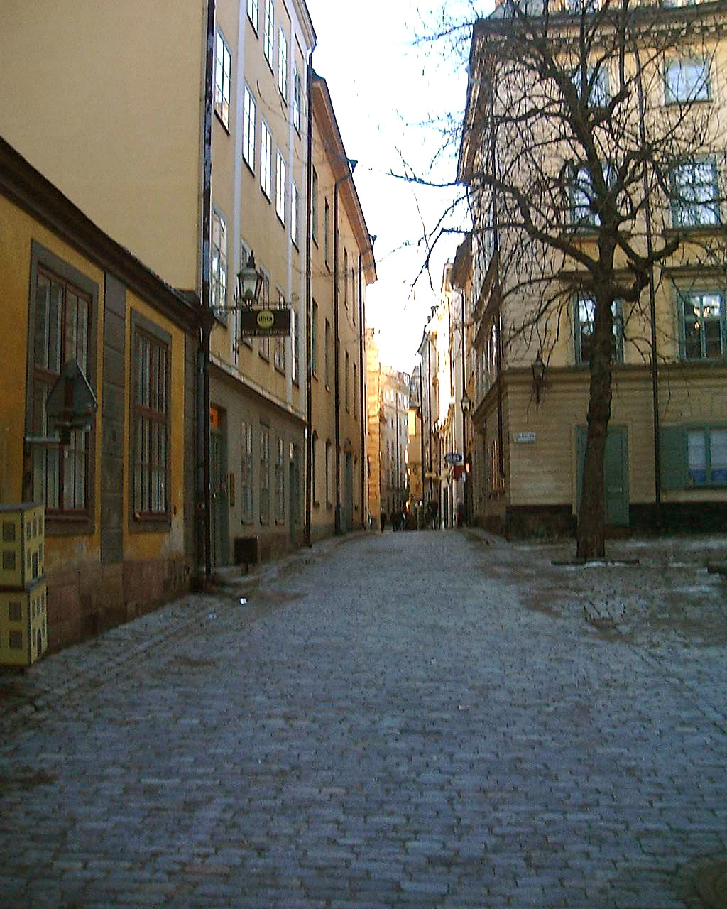 Svartmangatan in February 2007.